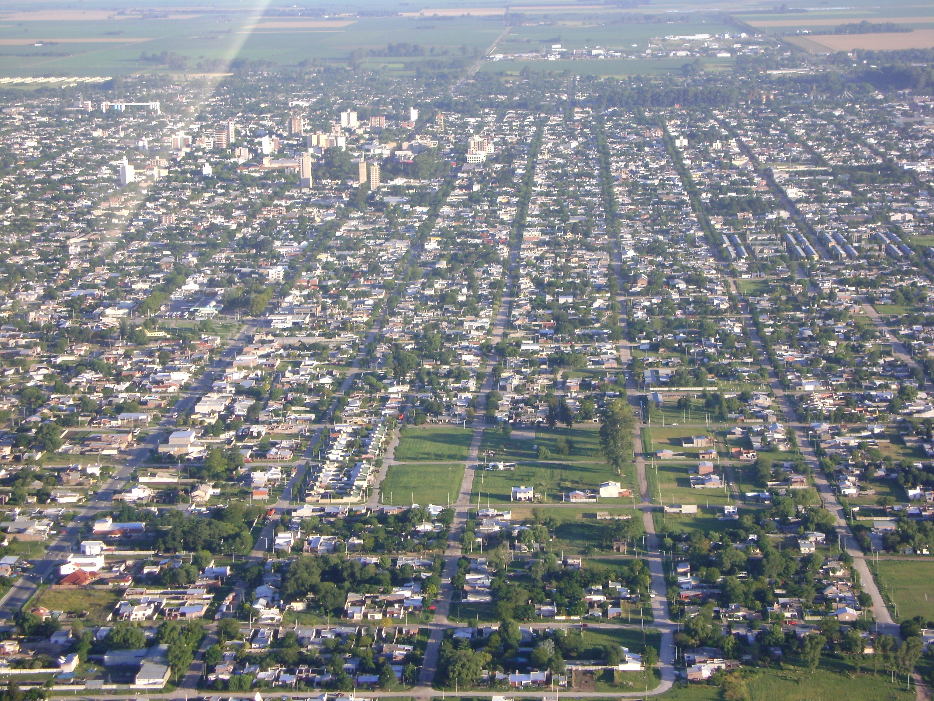 Aérea de la ciudad de Venado Tuerto, Argentina.